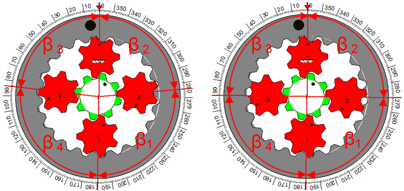 Ungleiche Winkelteilung der Plantenräder bei einem Umlaufgetriebe